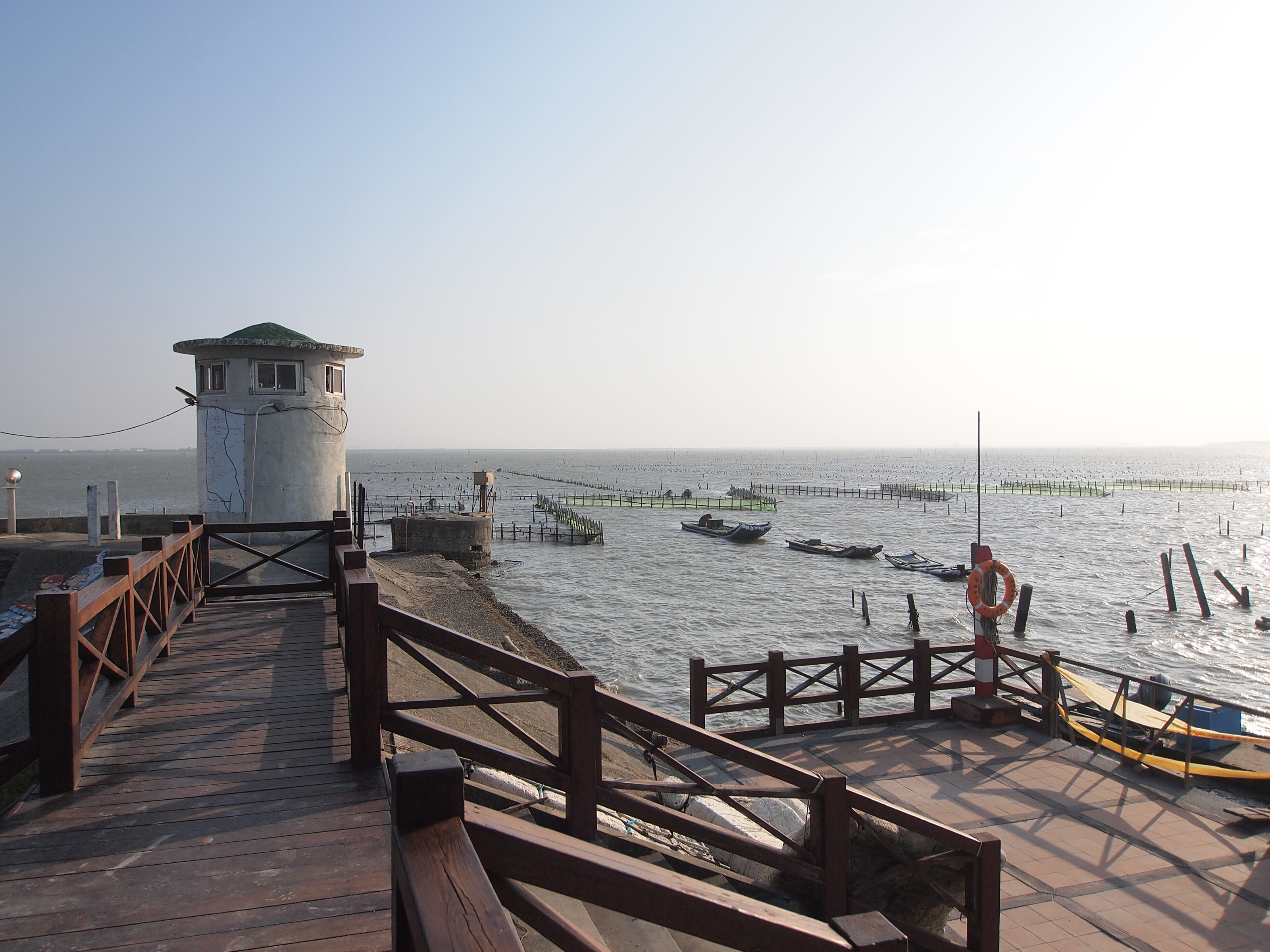 七股潟湖 - Qigu Lagoon - 2012.02